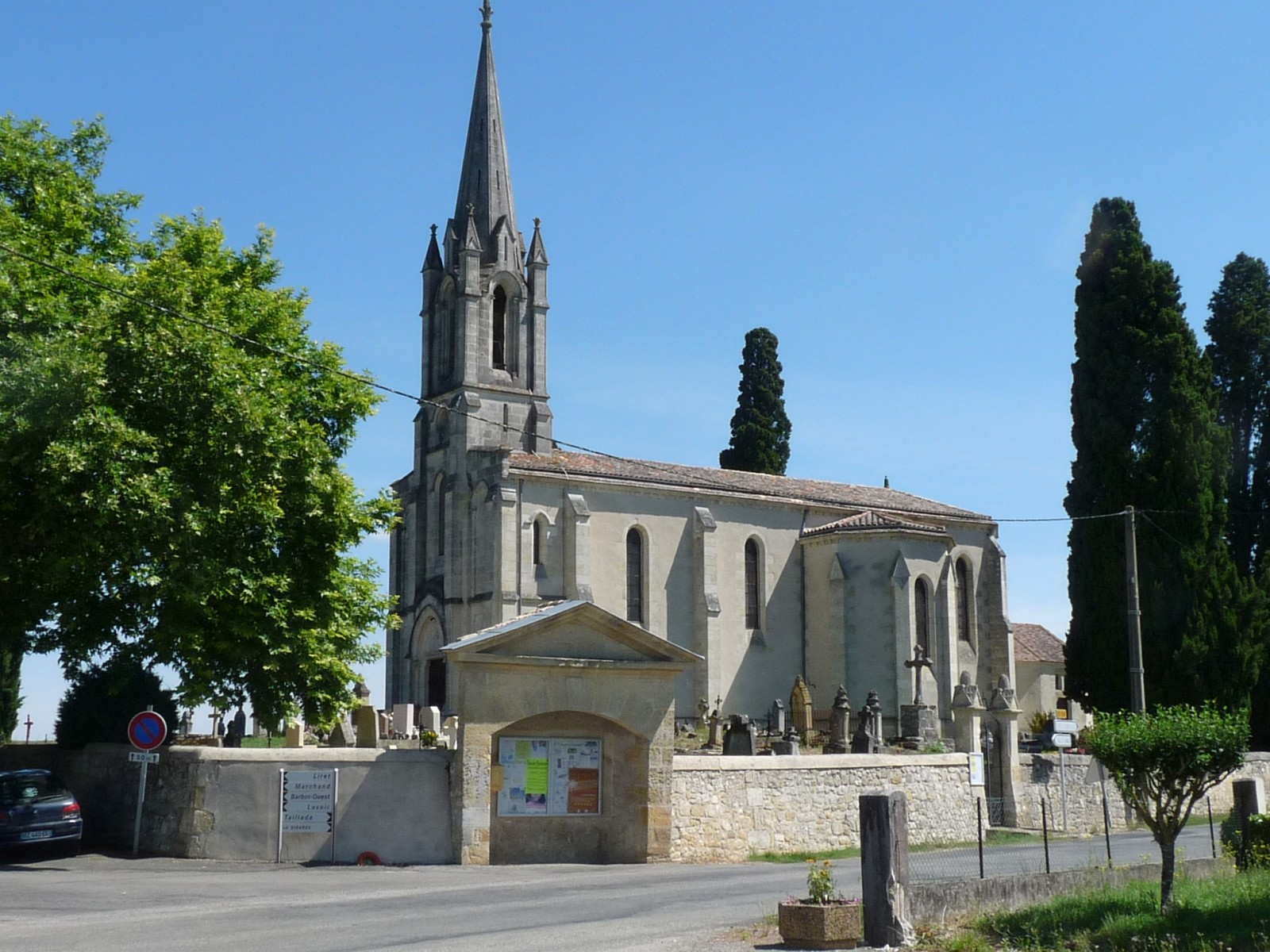 Eglise de St-Quentin-de-Caplong, Gironde, France